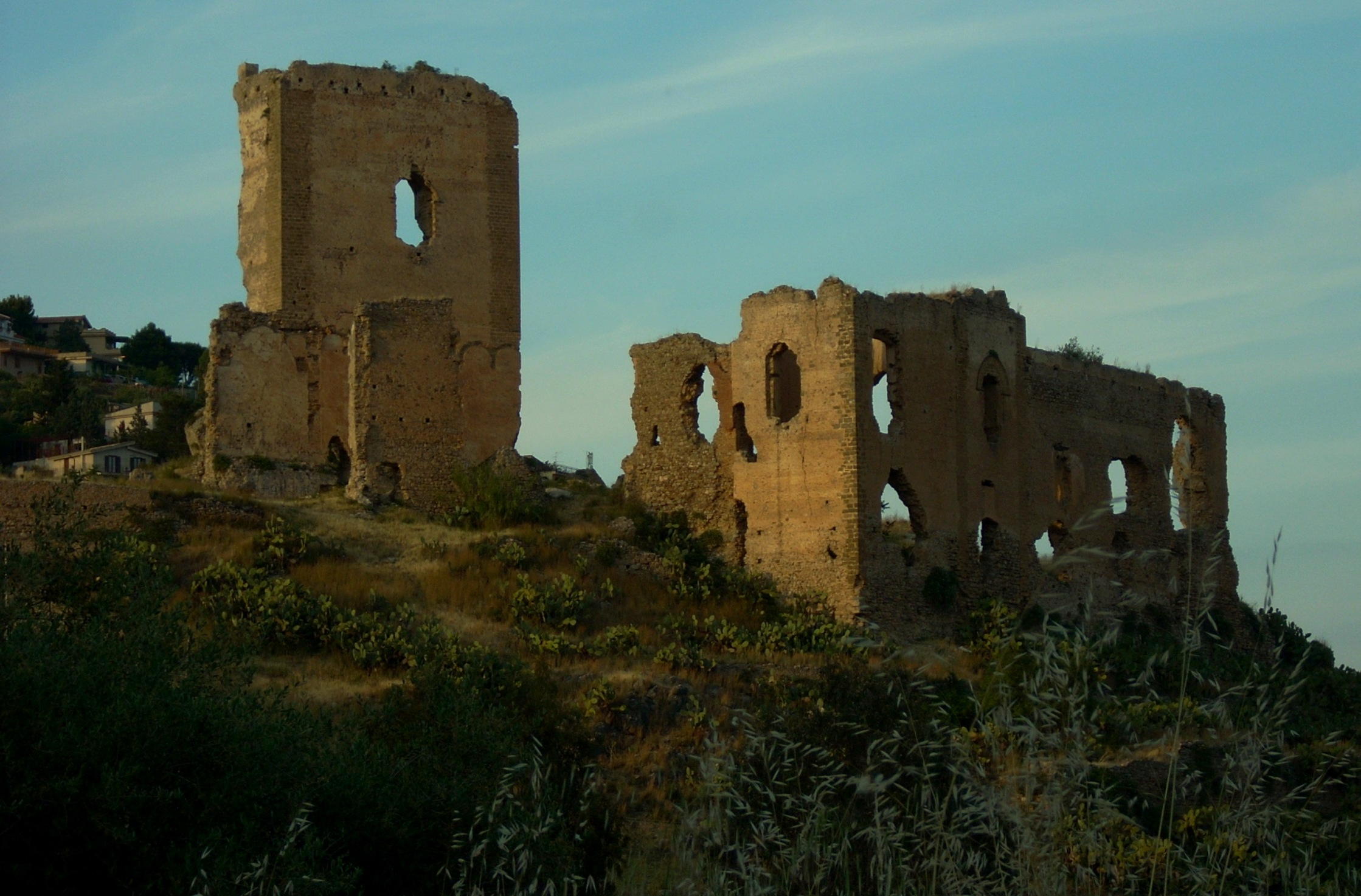 Il Castello dell'Emiro lato paese